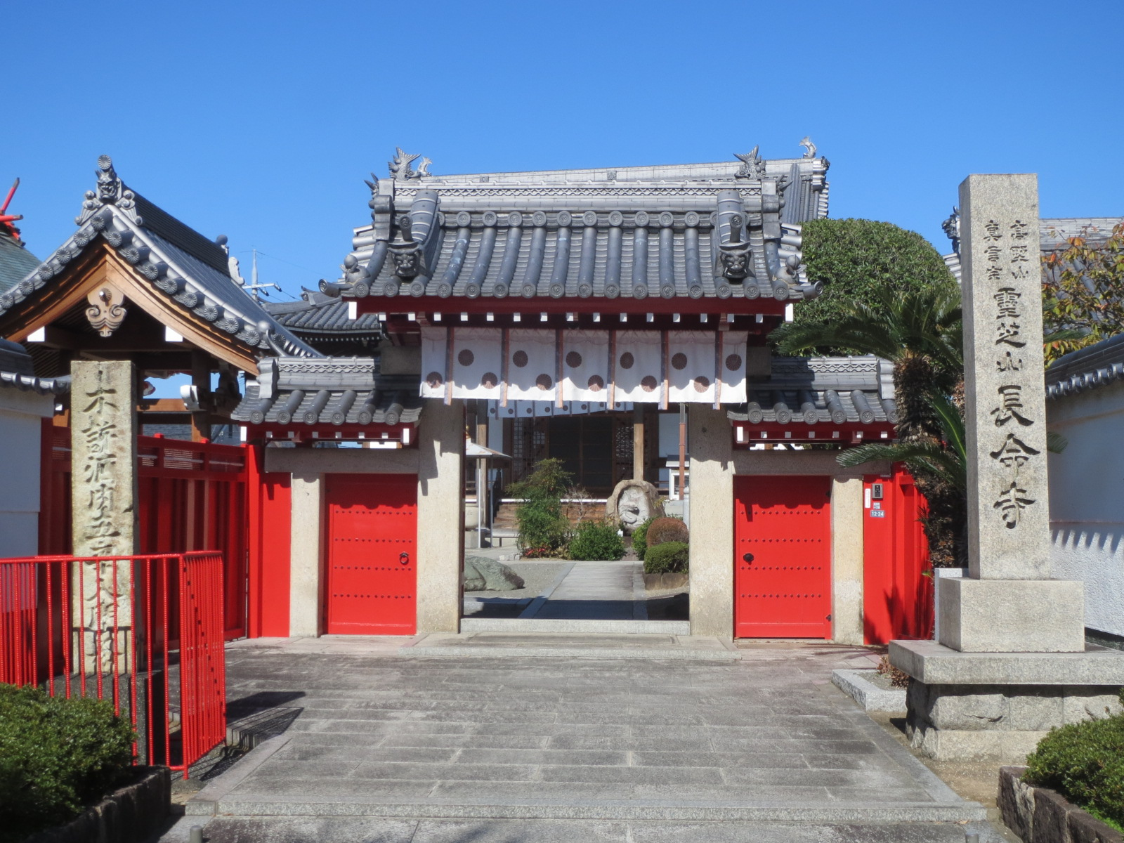 和泉市にある長命寺